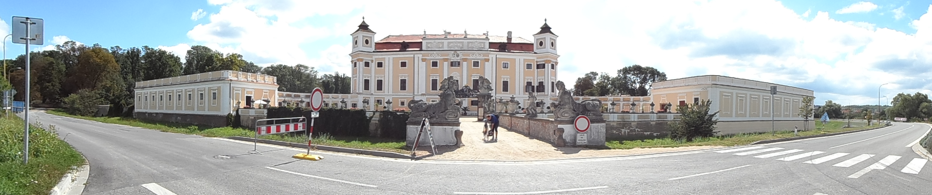 Zámek Milotice